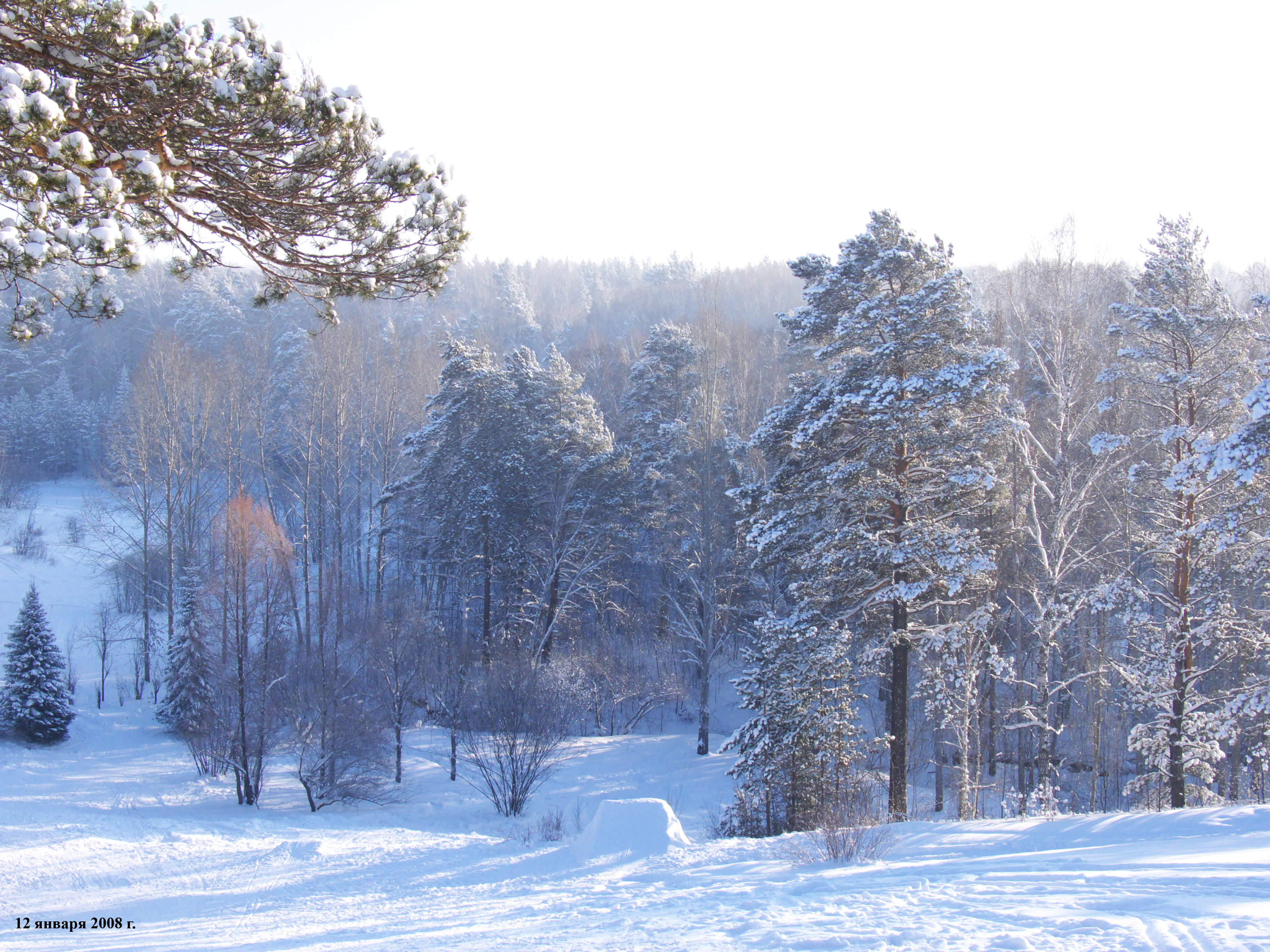 Центральный сибирский ботанический сад - зима